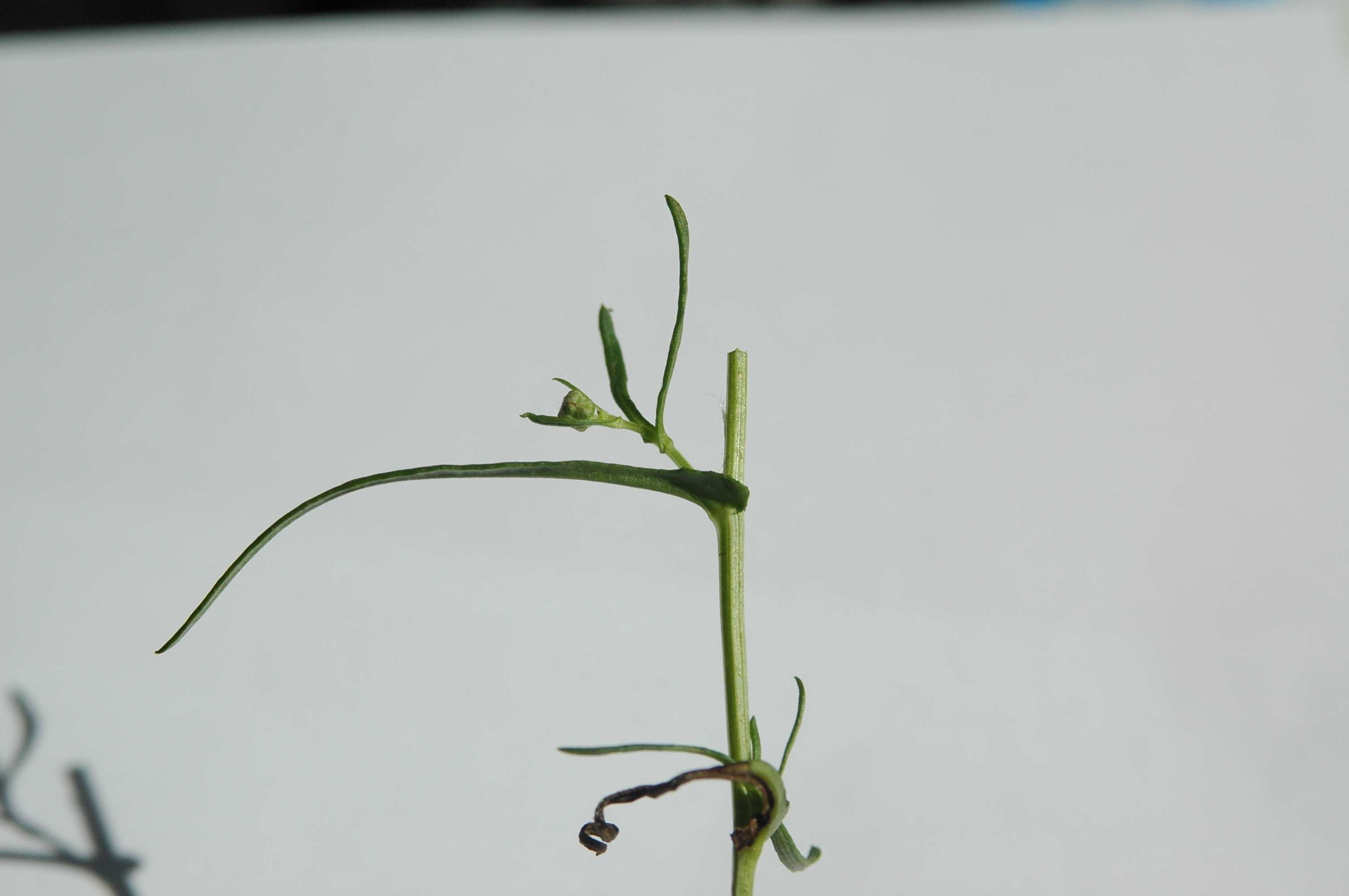 Foto gemaakt bij station Sloterdijk Amsterdam